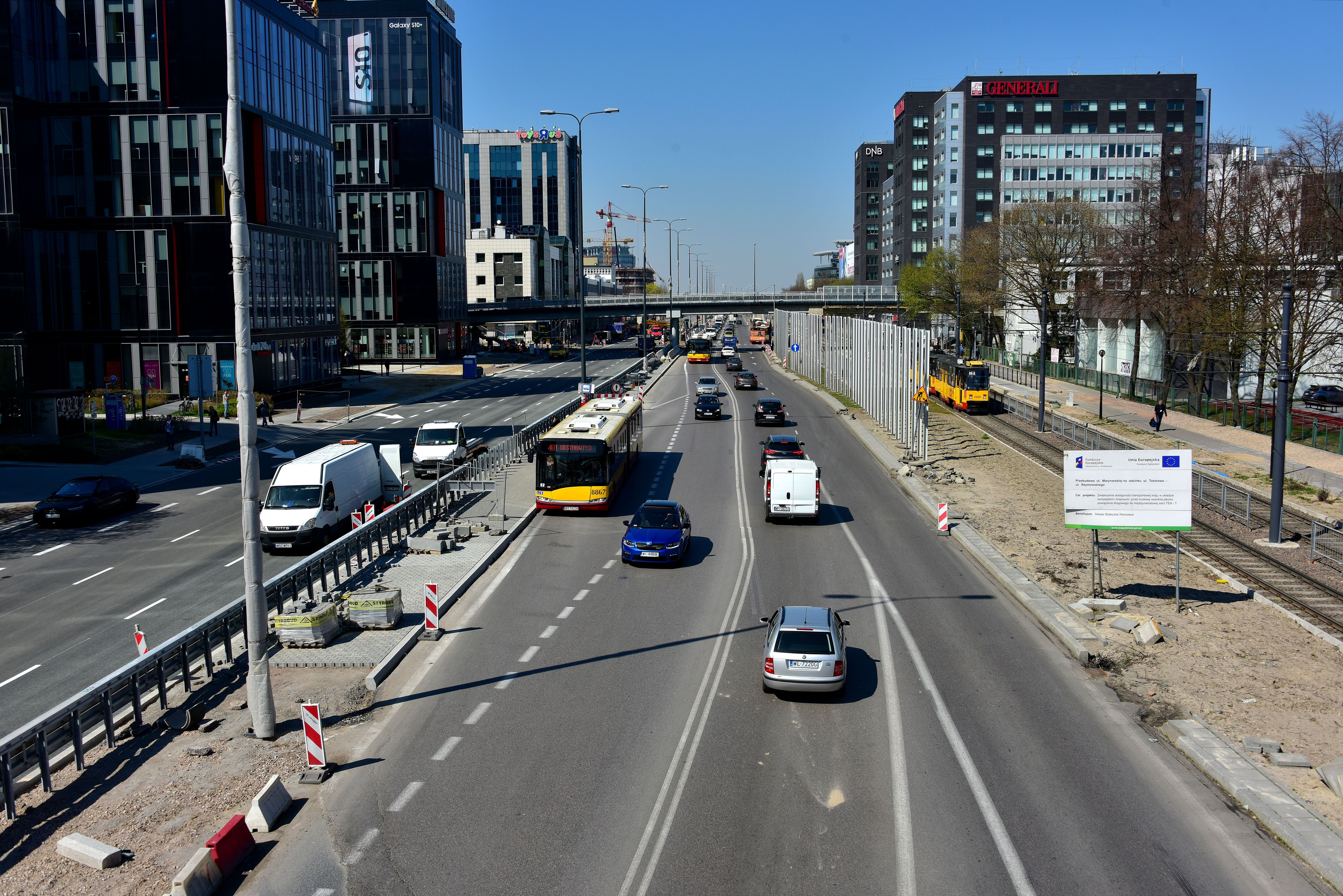 Ulica Marynarska w Warszawie